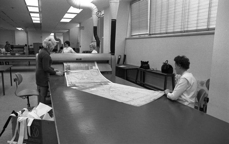 VW-Werk, Wolfsburg Forschung und Entwicklung Zeichnungs-Lichtpausanlage 1. März 1973